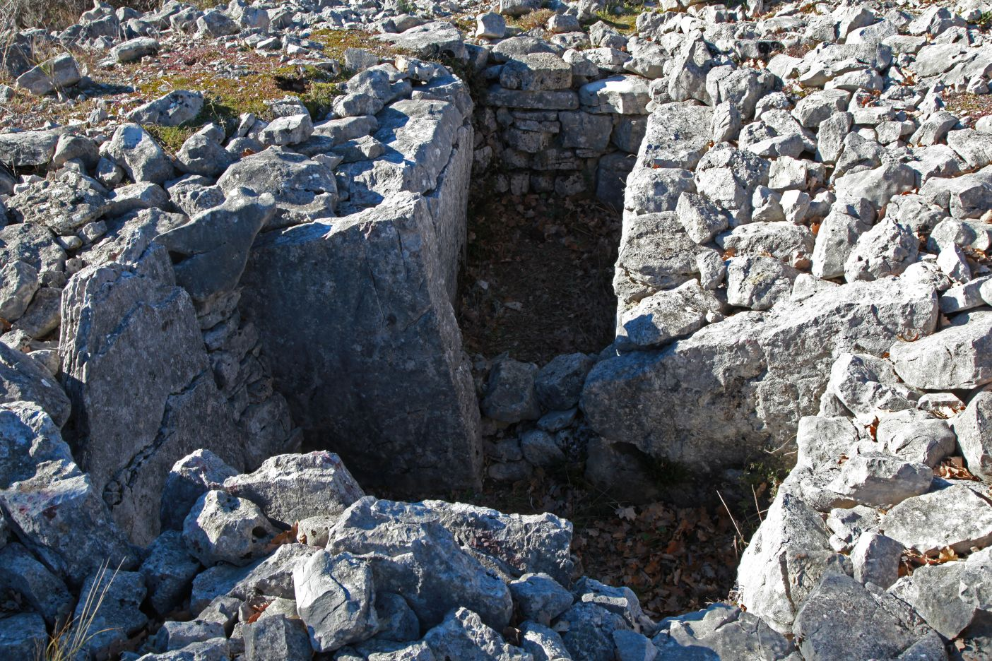 Saint-Cézaire-sur-Siagne - Dolmen de Mauvans sud